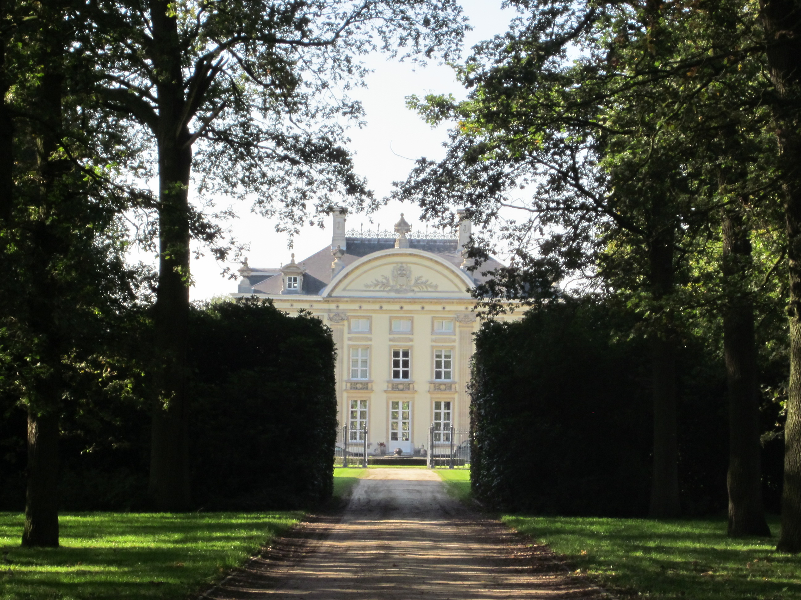 Kasteel van Ardooie of Kasteel de Jonghe d' Ardoye 47″ N, 3° 14′ 01.32″ E